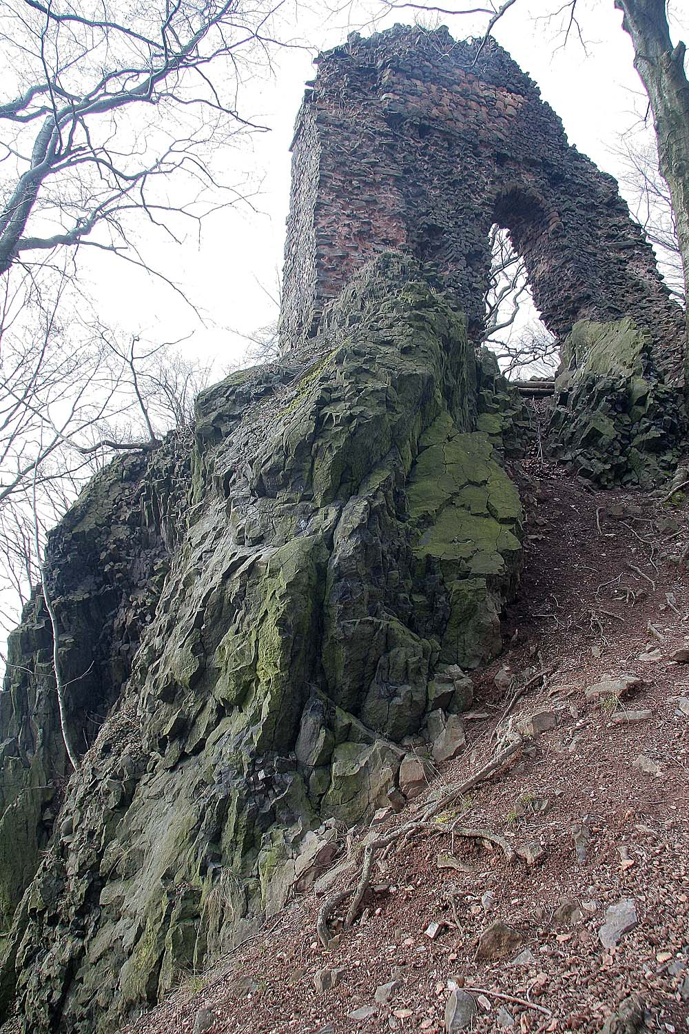 Věž hradu Bradlec Castle Bradlec, district Semily autor: Prazak date: 23. 2. 2007